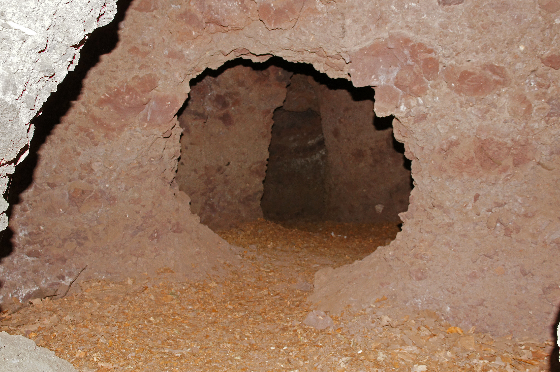 Innenaufnahme in einer der Sieben Stuben im Schlackenwall des Kottenheimer Büden